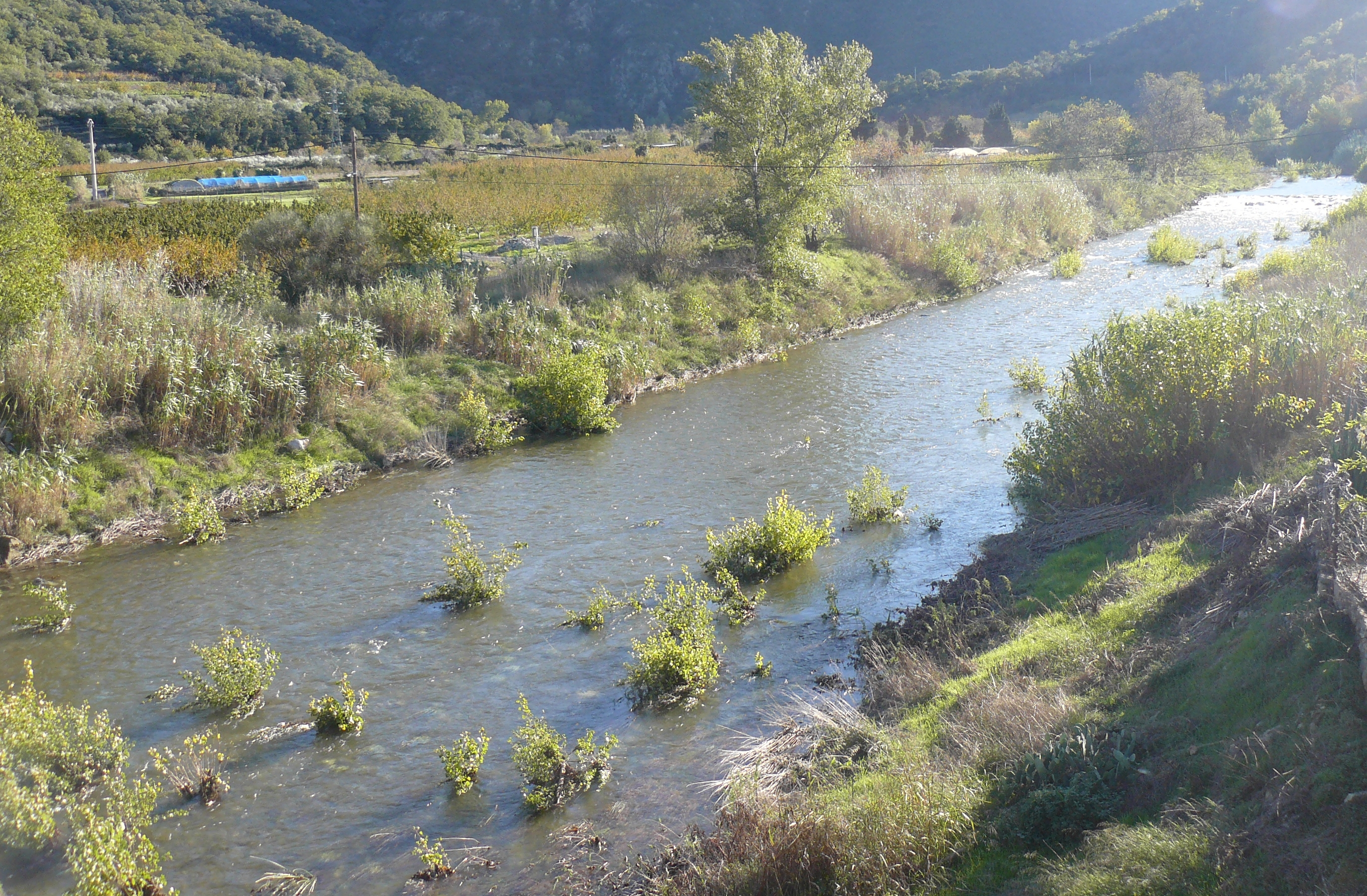 Rivière le Boulés vue de Bouleternère.